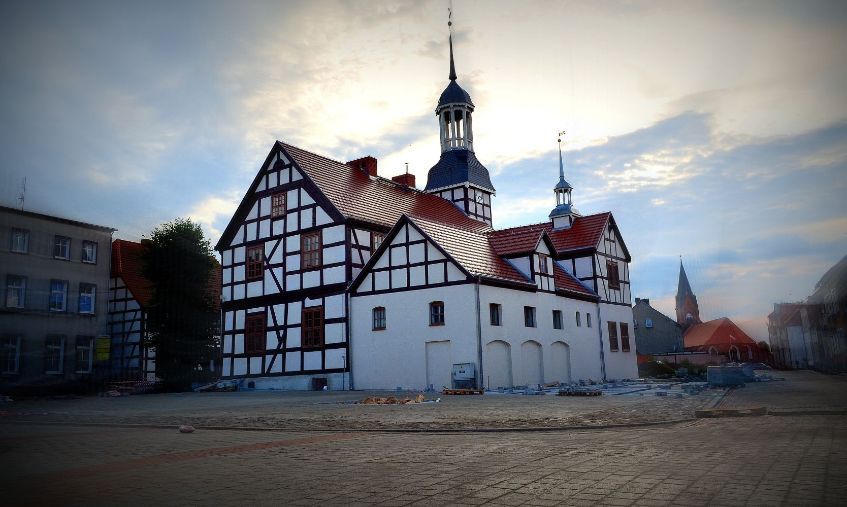 Ratusz Nowe Warpno